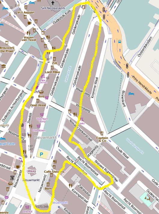 Geografie van dit gebied via